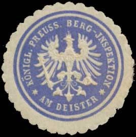 Sealing stamp Title: K.Pr. Berg-Inspektion am Deister Description: Bergbau, blau, weiß, geprägt Place: Deister size: 3 cm